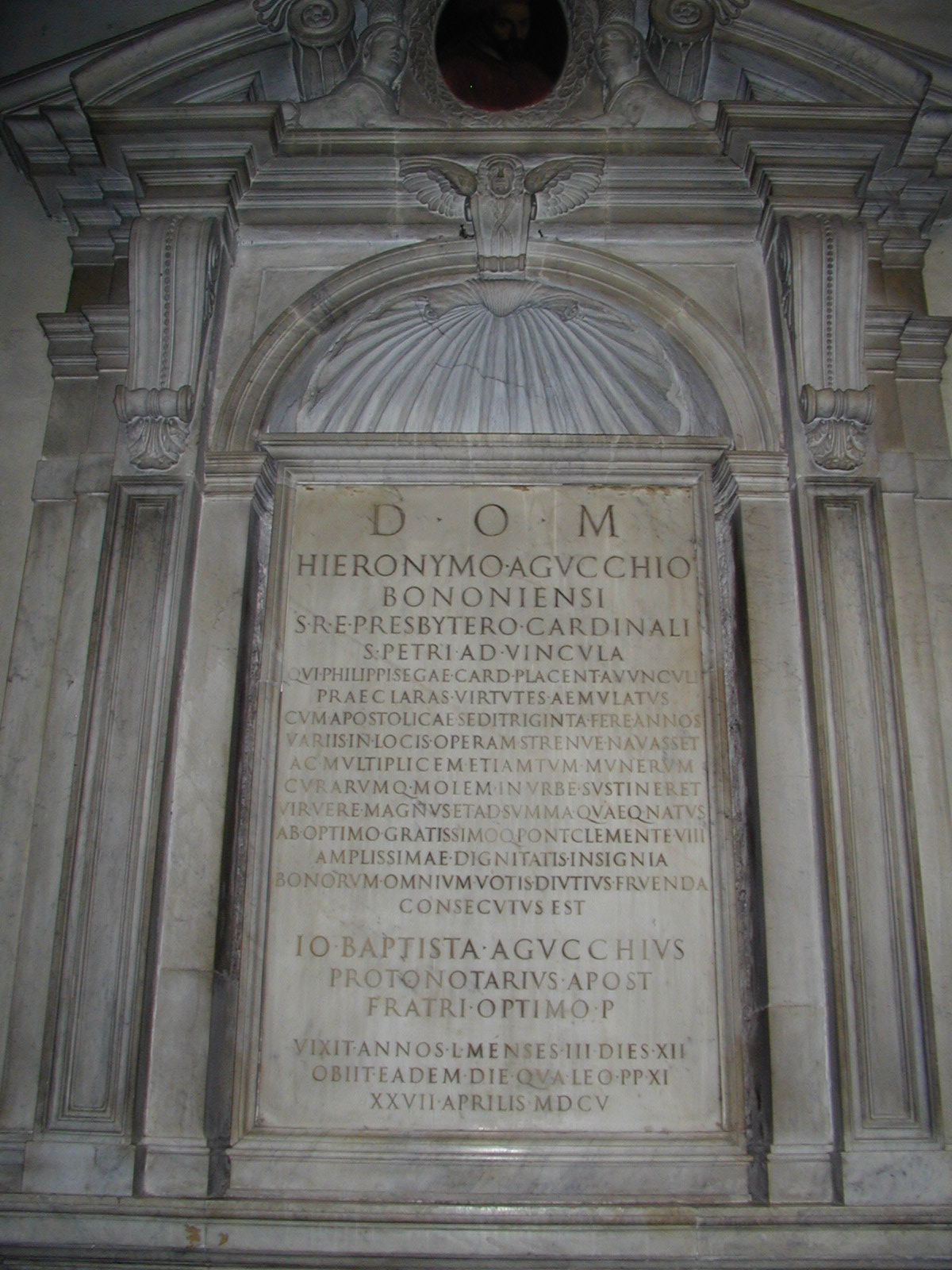 Tomba Girolamo Agucchi - Chiesa San Pietro in Vincoli - Roma